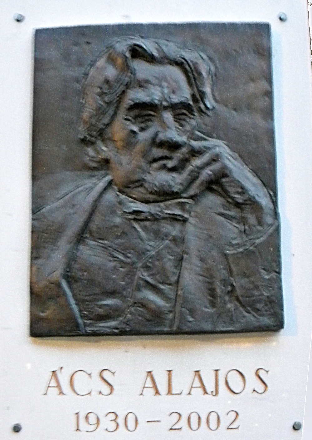 Ács Alajos emléktábla (Lakatos Pál Sándor alkotása, 2003)[1]. - Szatmárnémeti (Satu Mare), Strada Horea 5.